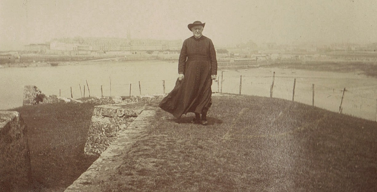 L'historien Louis Duchesne (1843-1922) marchant sur le fort de la Cité d'Aleth, à Saint-Servan-sur-Mer. Derrière, la cité corsaire de Saint-Malo, France.